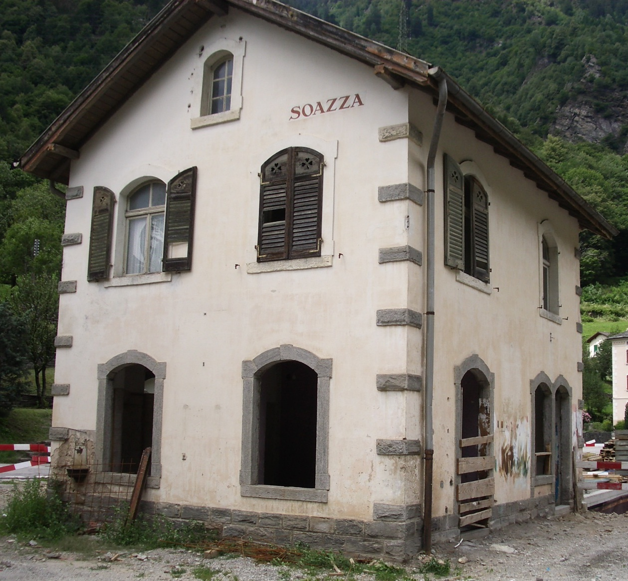 Soazza GR, Switzerland self-made, August 2006